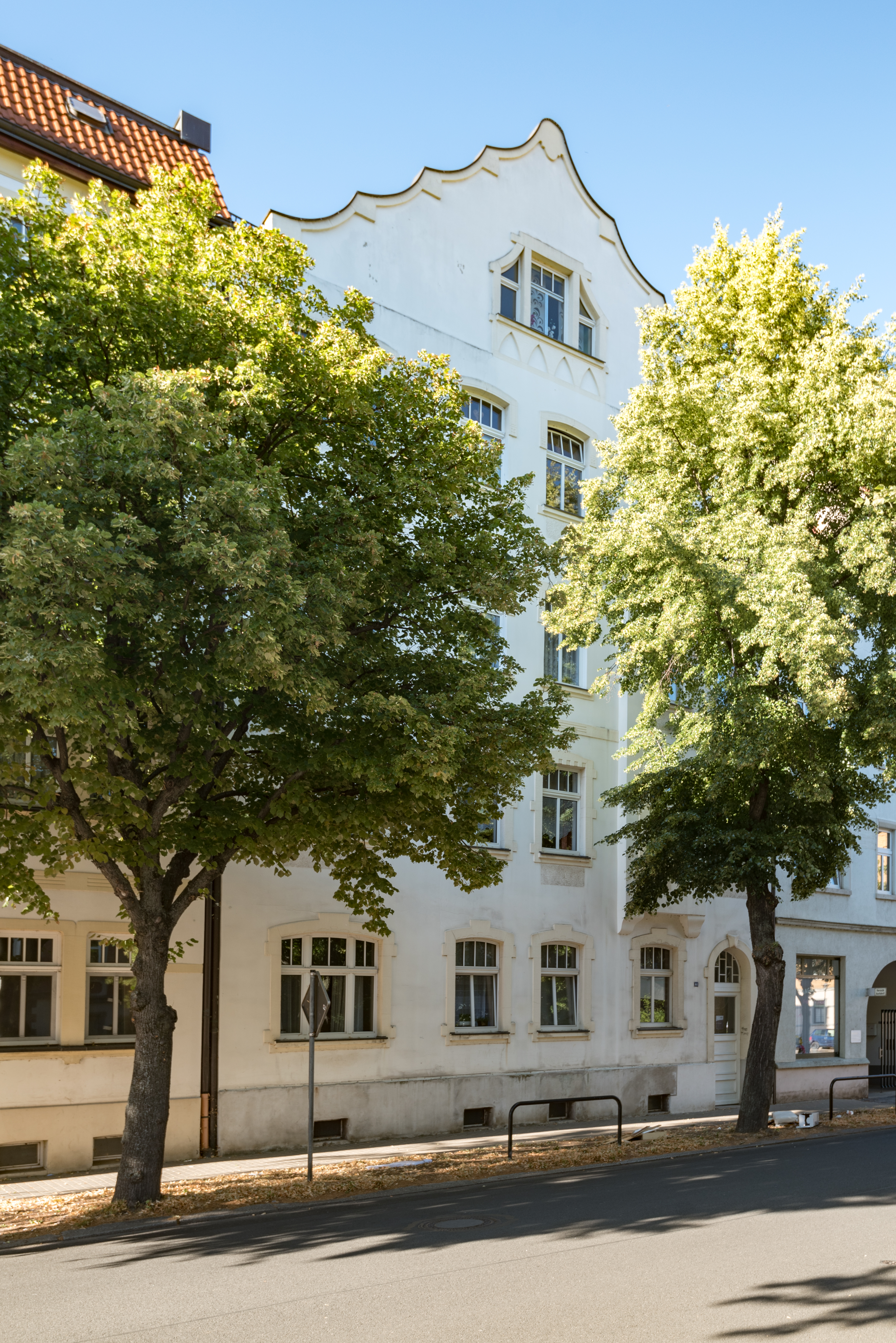 Weißenfels, Beuditzstraße 61